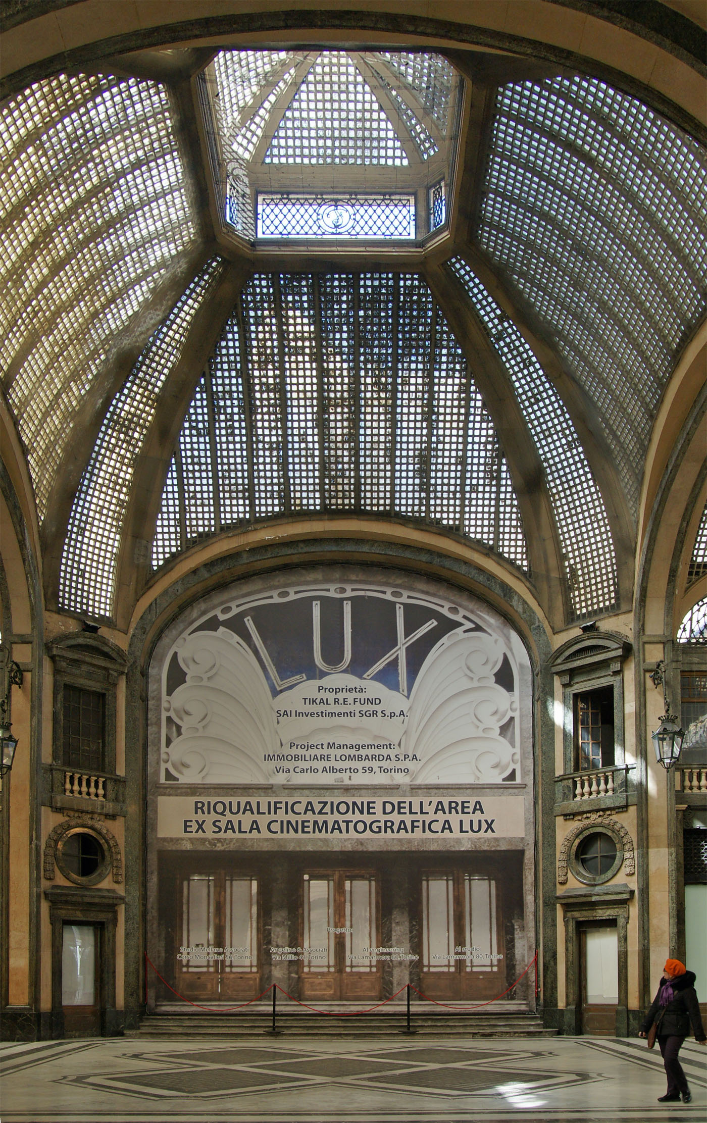 Galleria San Federico, Lux Cinema - Torino - Italia.